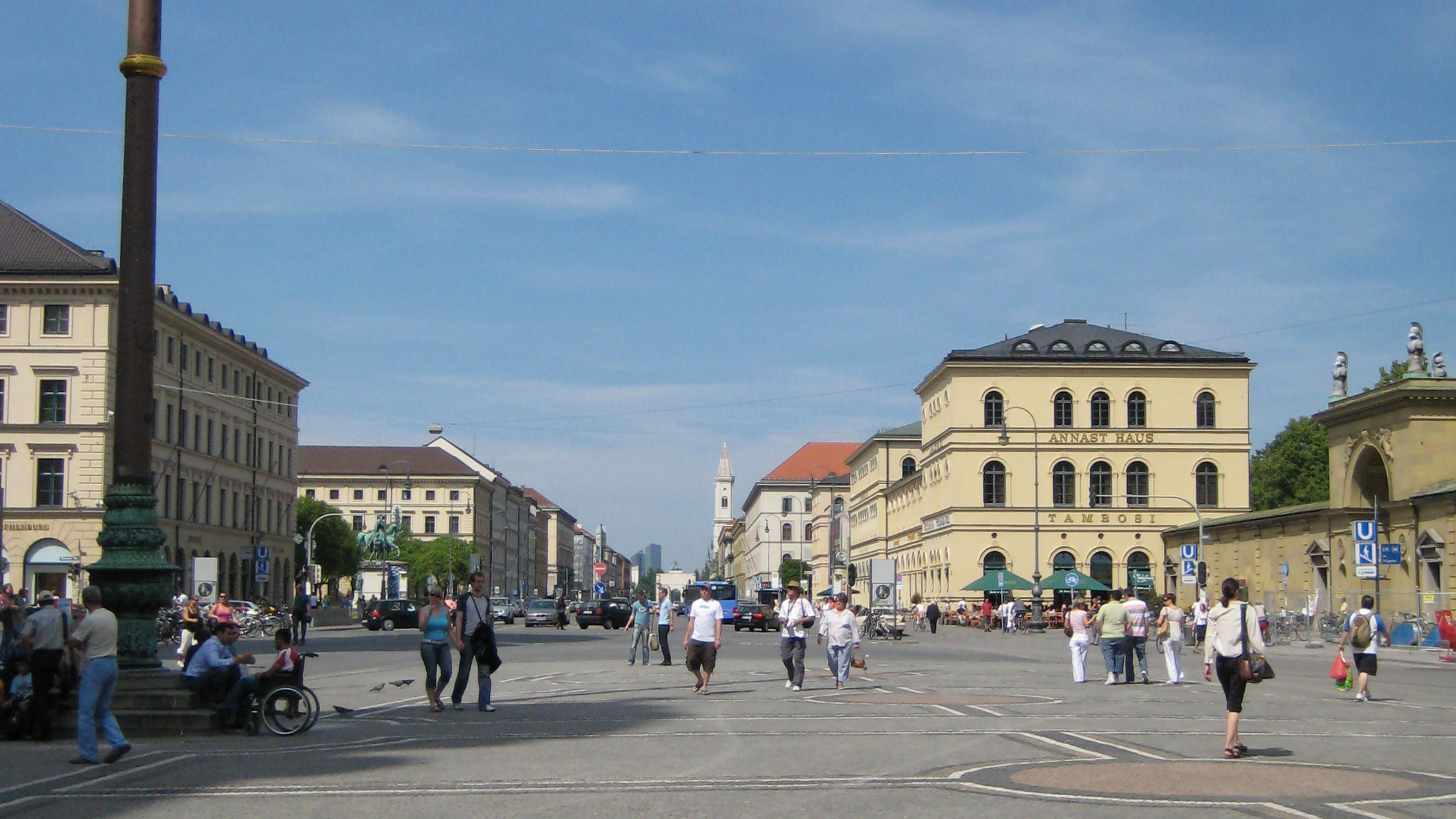 Odeonsplatz von der Feldherrnhalle aus gesehen mit Blick nach Norden durch die Ludwigstraße.